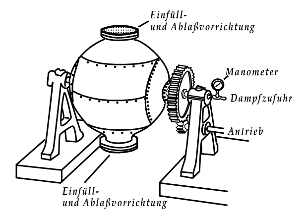 Kugelkocher, Schema